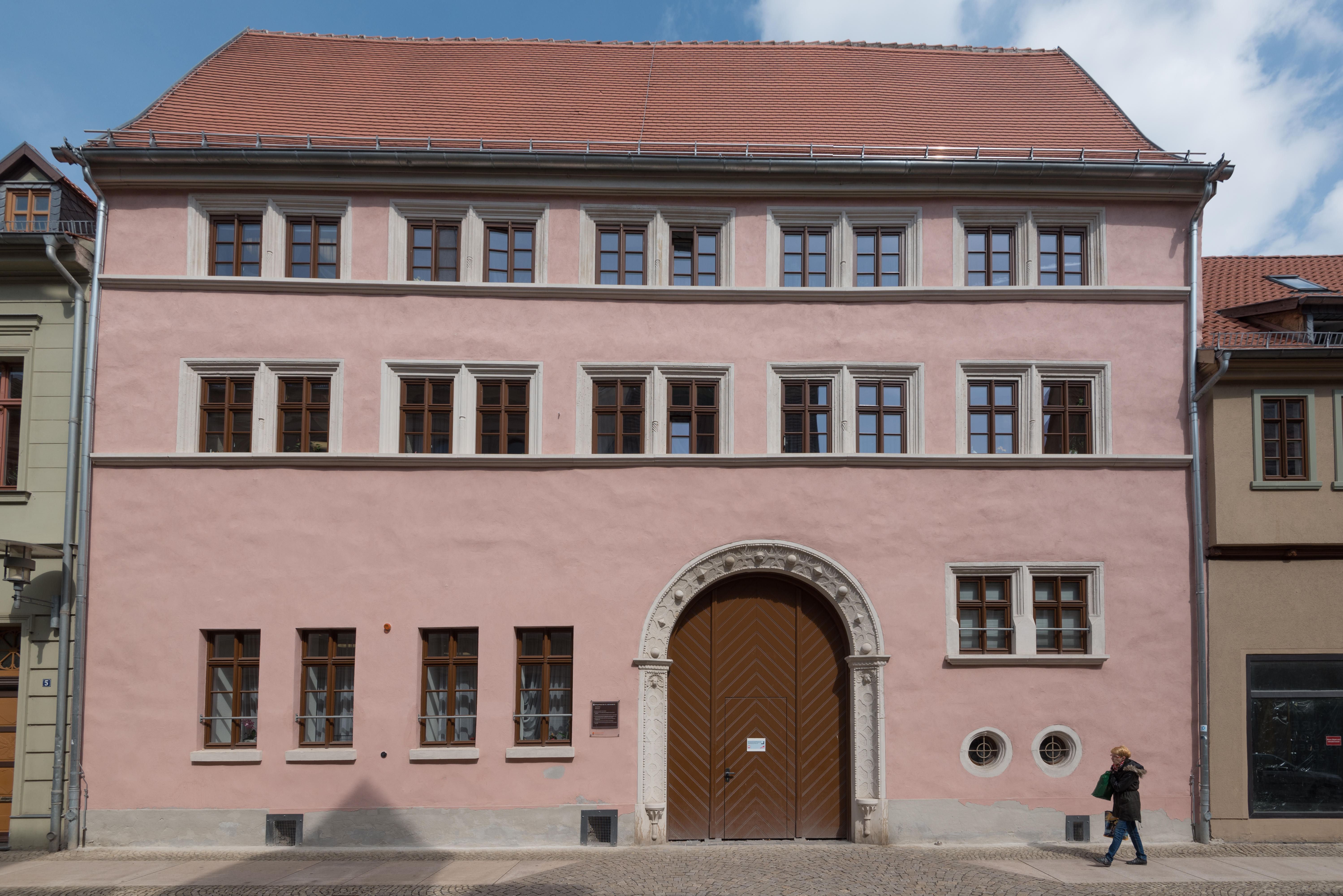 Aschersleben, Hohe Straße 4